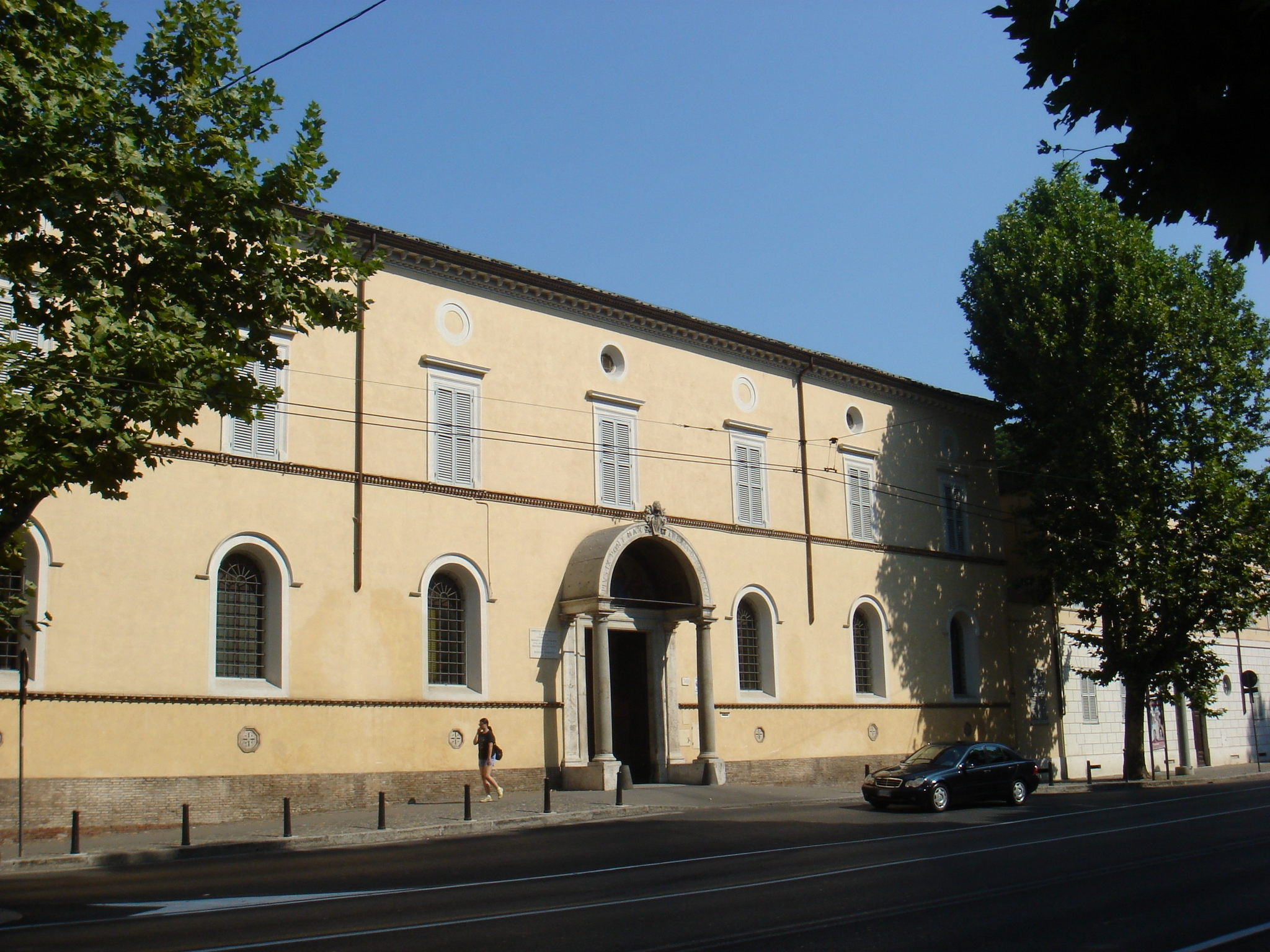 Roma , sant'Agnese fuori le mura: prospetto su via Nomentana. Licensing